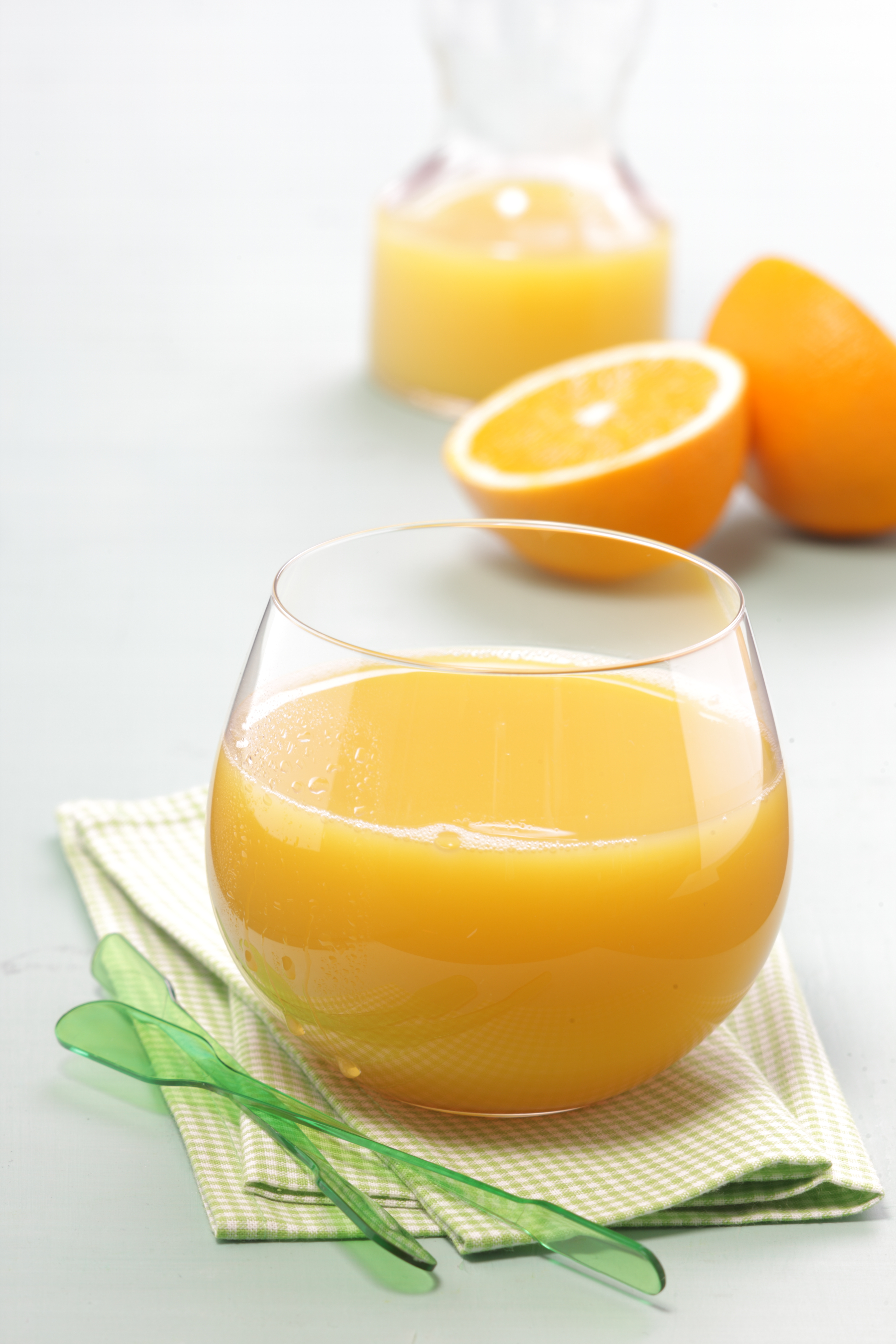 Orangensaft